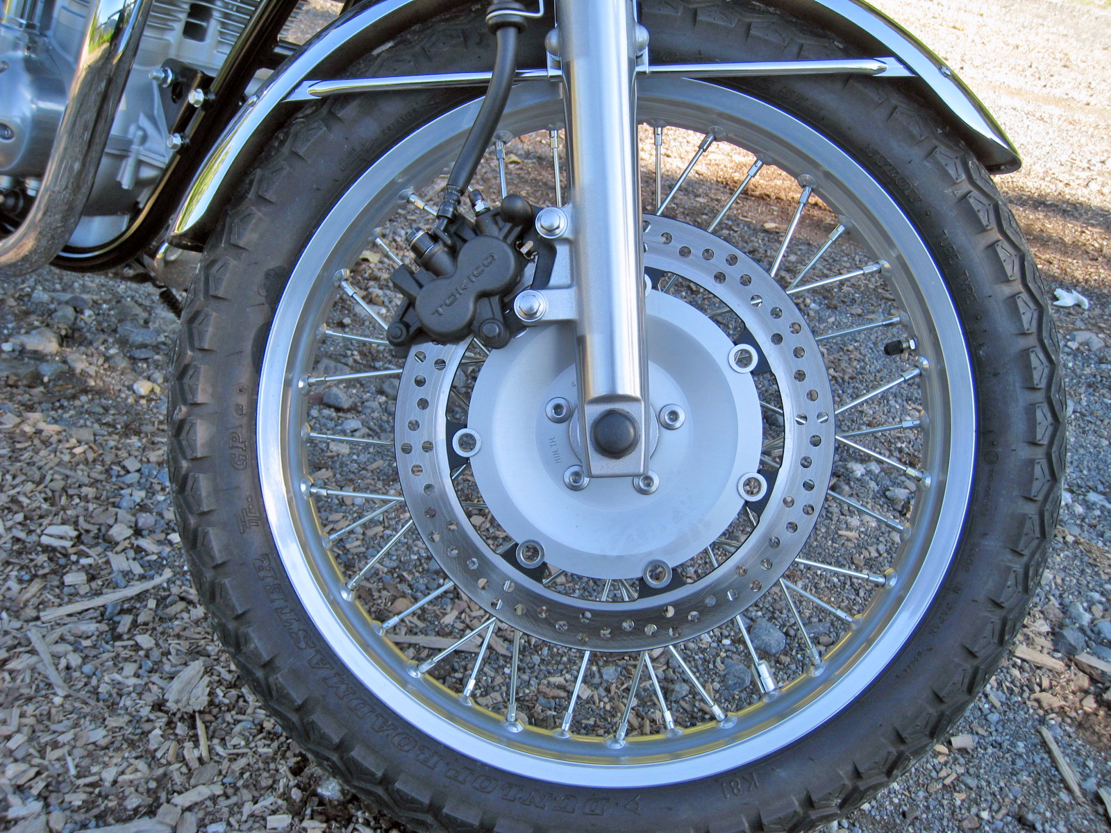 Scheibenbremse bei der Kawasaki W800